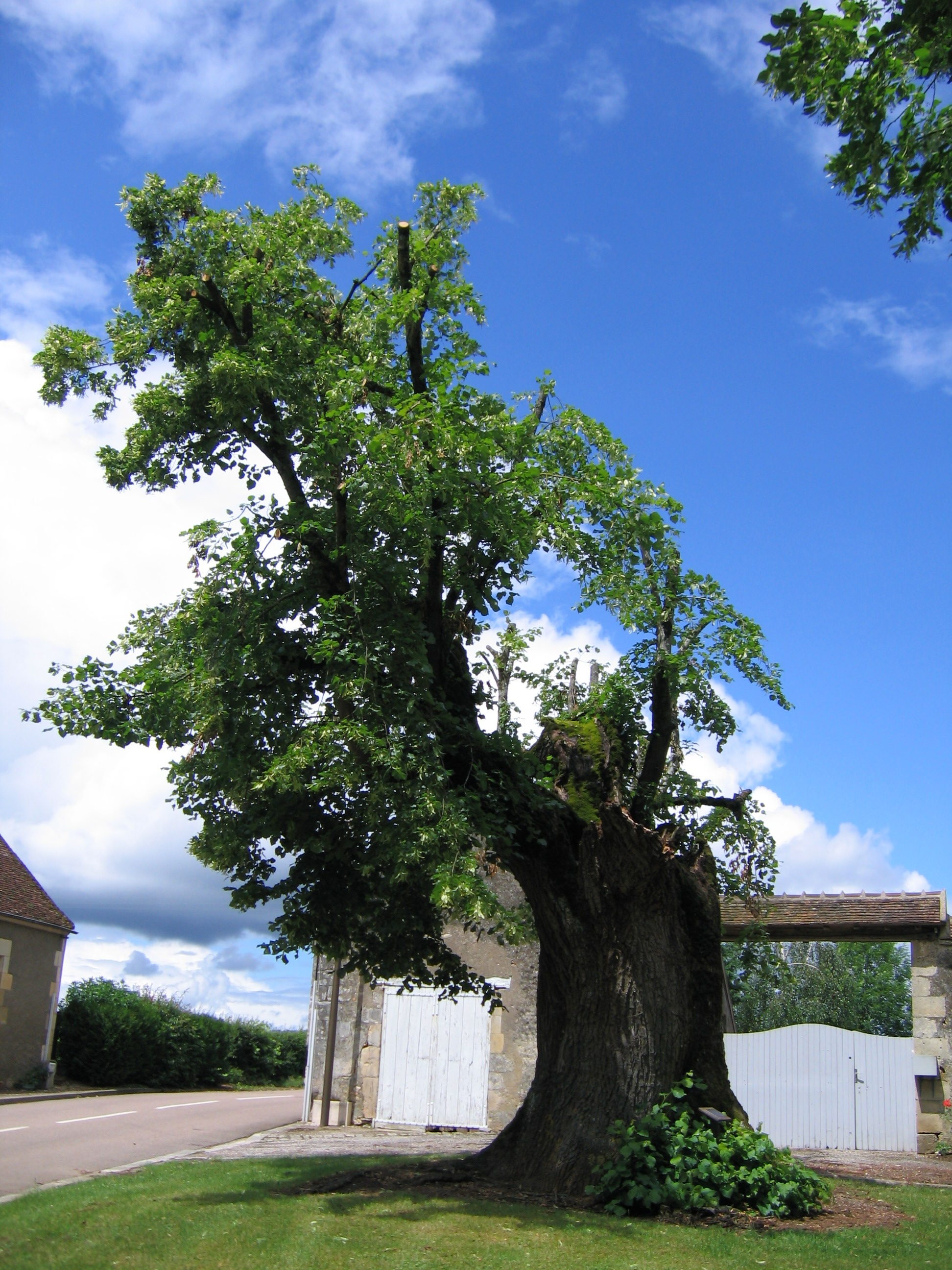 tilleul Sully Sainte Colombe des Bois après orage mai 2007